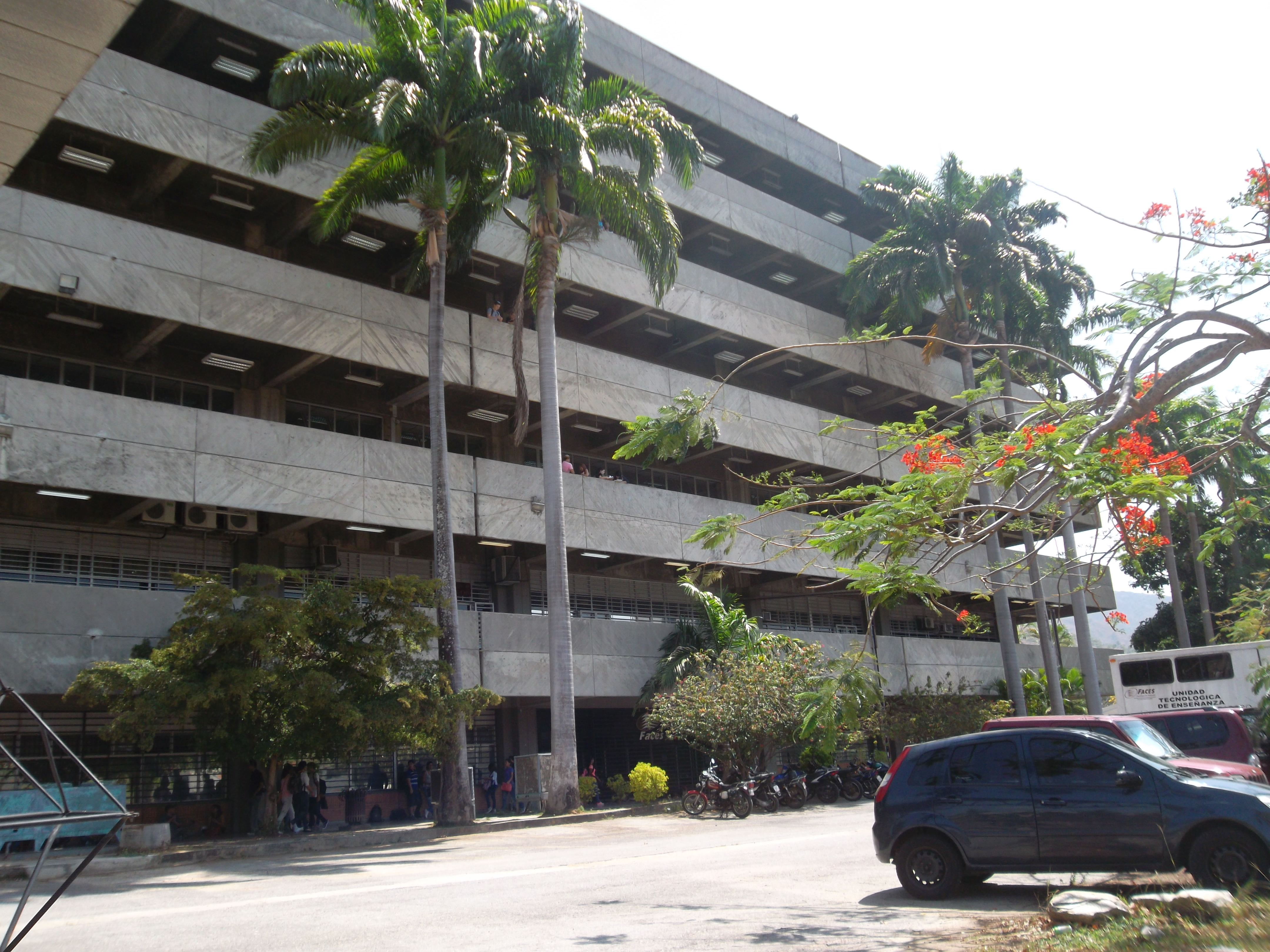 facultad de ciencias económicas y sociales de la universidad de carabobo, campus barbula, edo.carabobo.